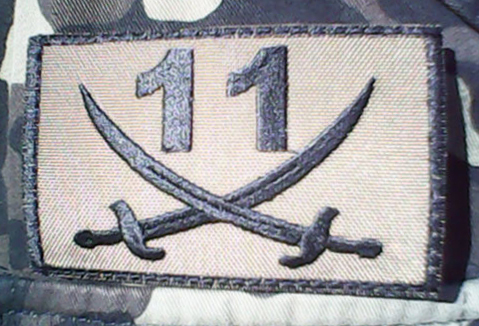 Емблема 11-го БТрО ЗСУ Київської області.